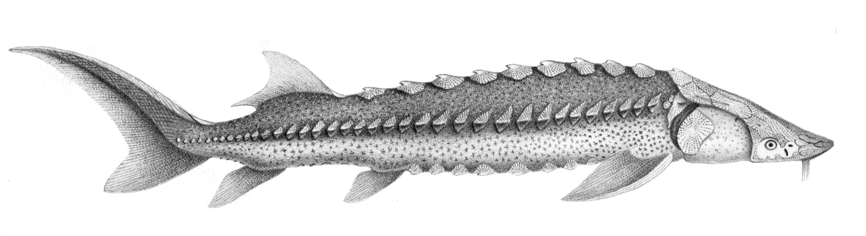 Acipenser (Antaceus) ayresii = Acipenser transmontanus